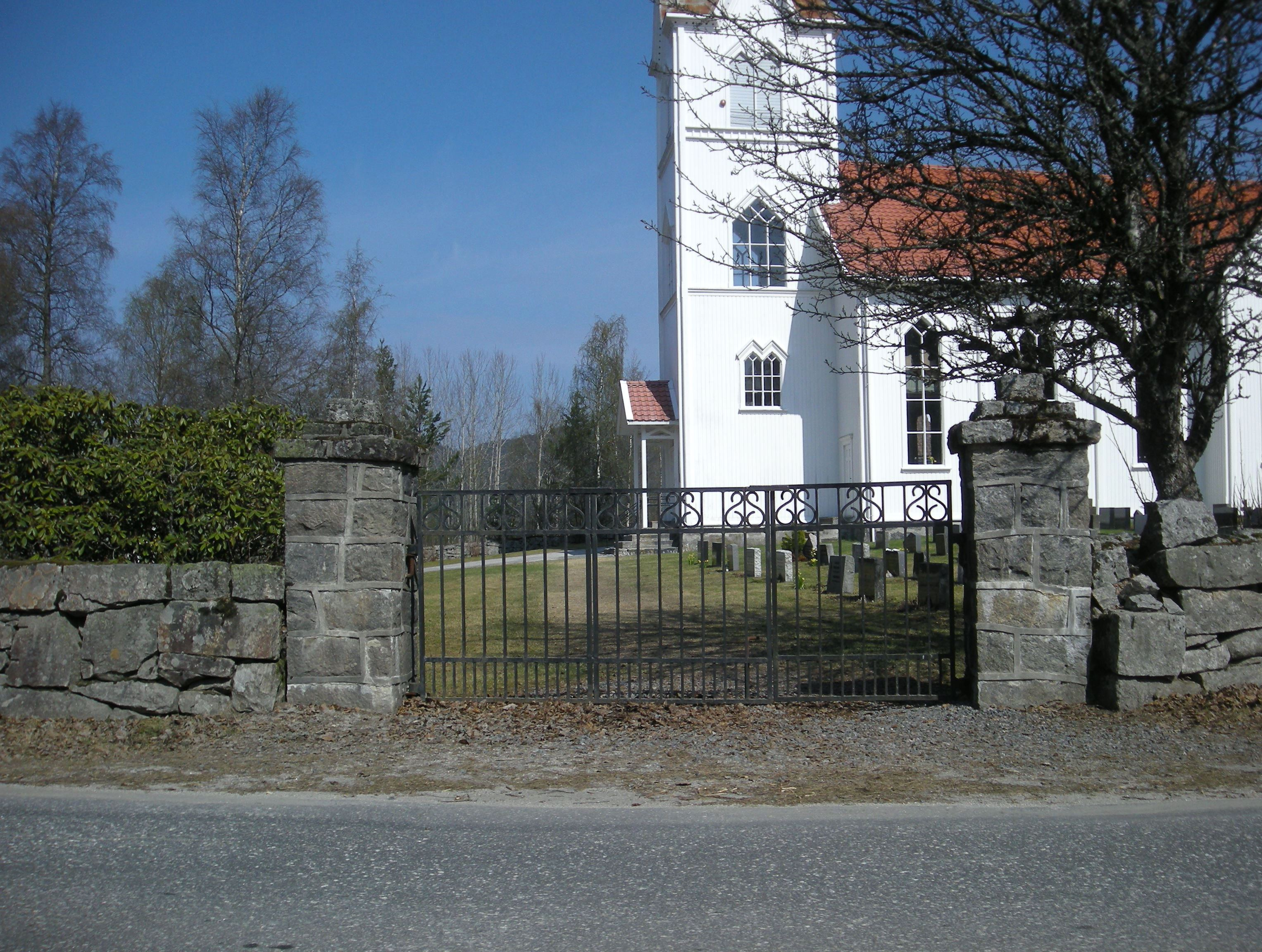 Fylkesvei 306 sør for Evje kirke i Setesdalen